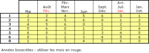 Calendrier perpétuel Moret. Tableau 2 : mois.